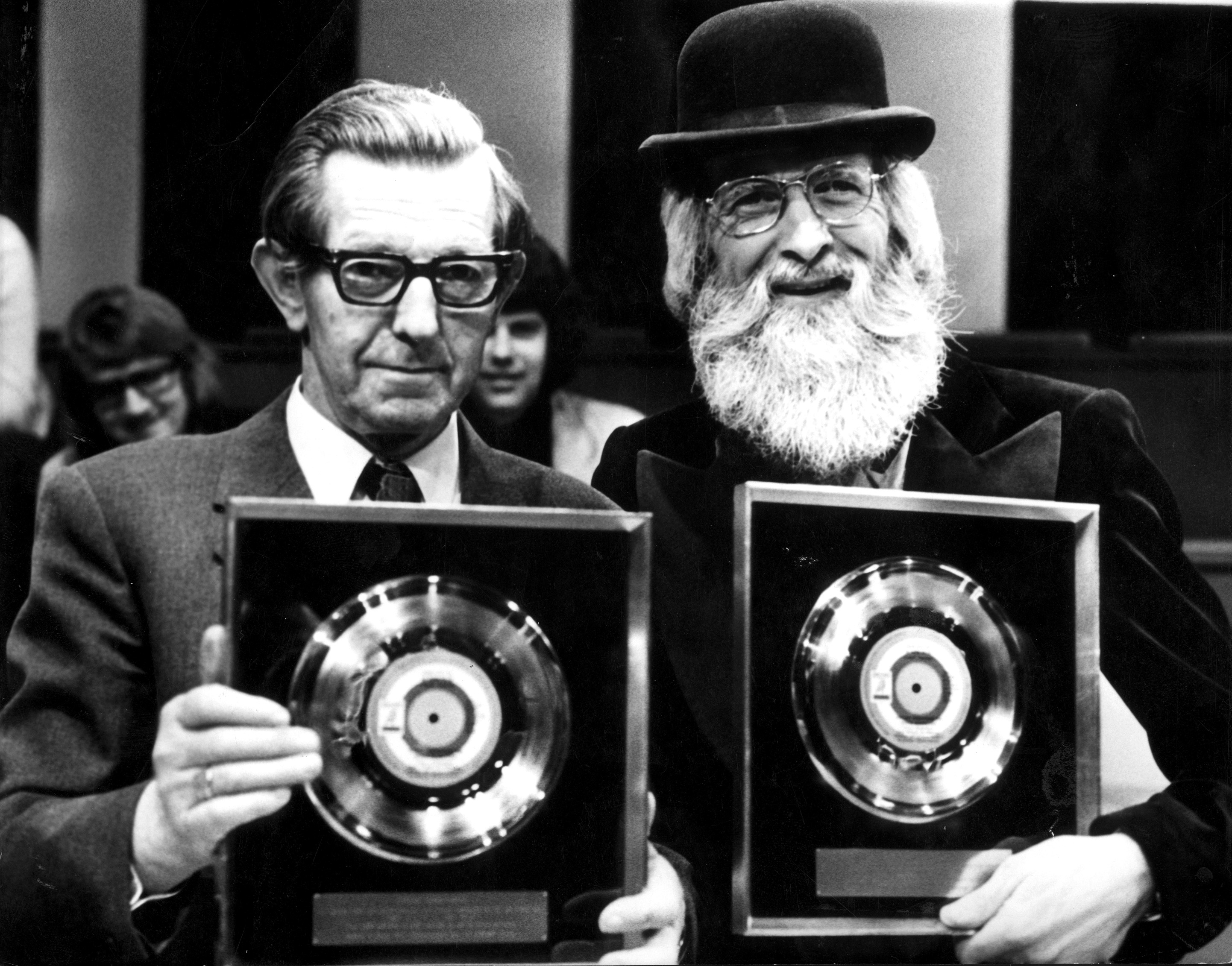 Hendrik Koekoek (bijnaam: Boer Koekoek) met Pierre Kartner [Vader Abraham] ontvangen op 20 februari 1974 een Gouden Plaat met hun carnavals-schlager: ' Den Uyl is in den olie '. De foto is gemaakt tijdens het tv-programma Op Losse Groeven.